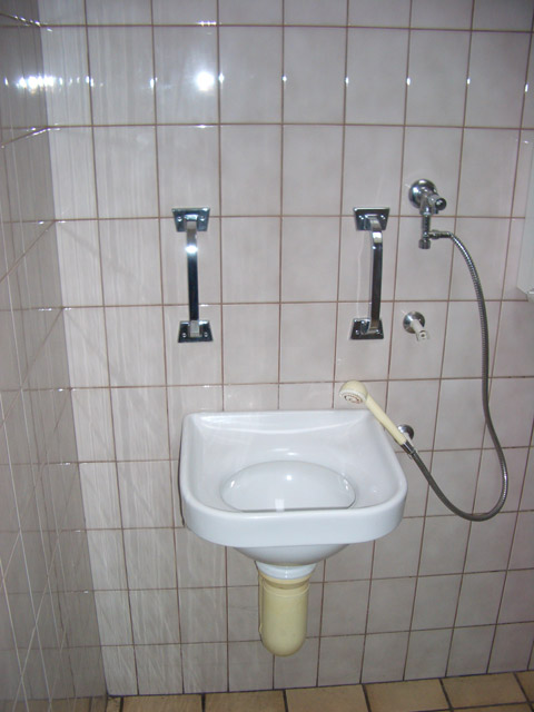 Speibecken in der Gastronomie, Pabst/Papst